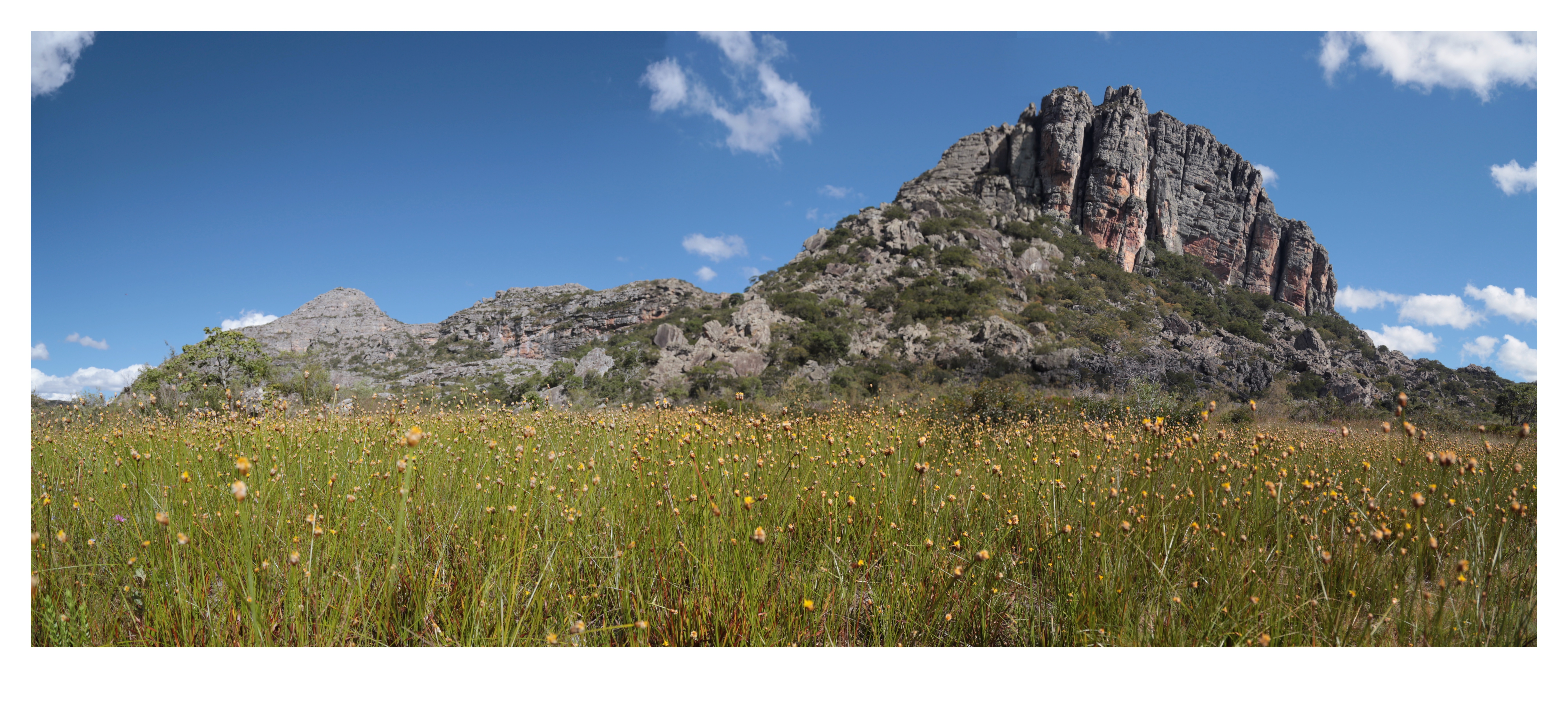 Na imagem, um campo de flores emoldura a Serra do Galho. Uma das várias formações da Serra do Espinhaço de Minas Gerais. O Parque é um centro de endemismo de Sempre-Vivas, ou seja, algumas dessas flores só ocorrem por ali.